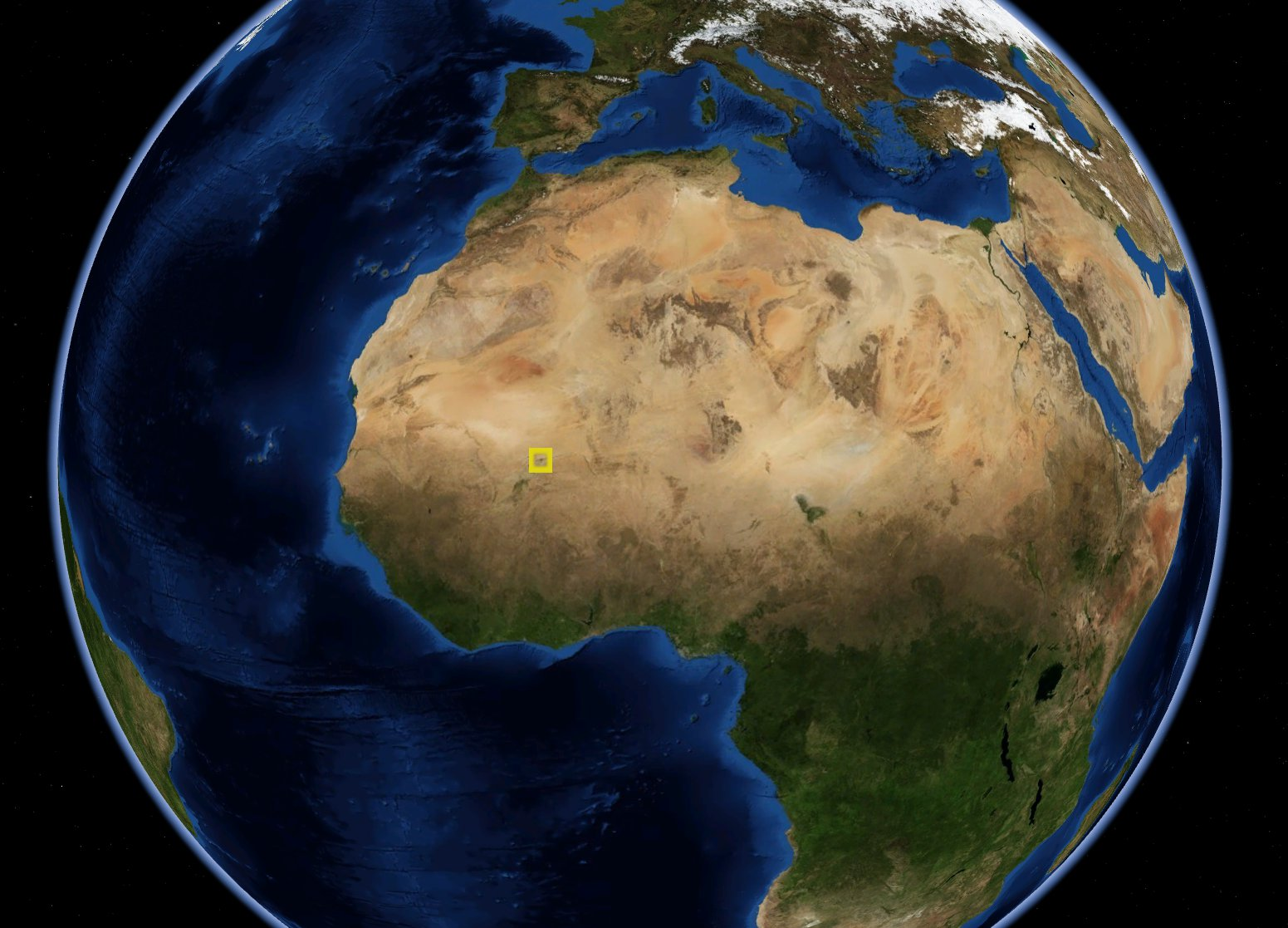 NASA World Wind; Timbuktu